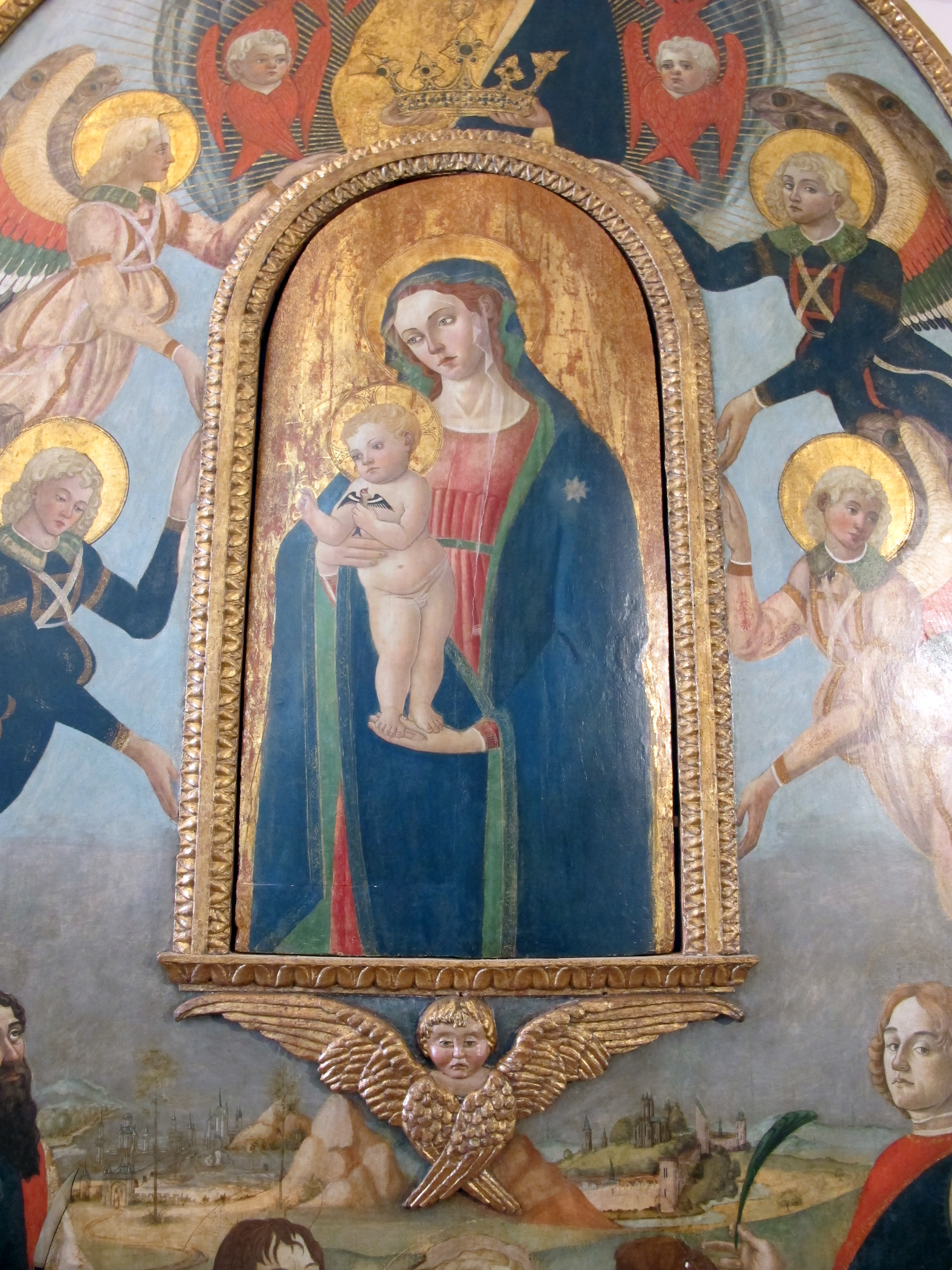 Museo della Misericordia (San Miniato)